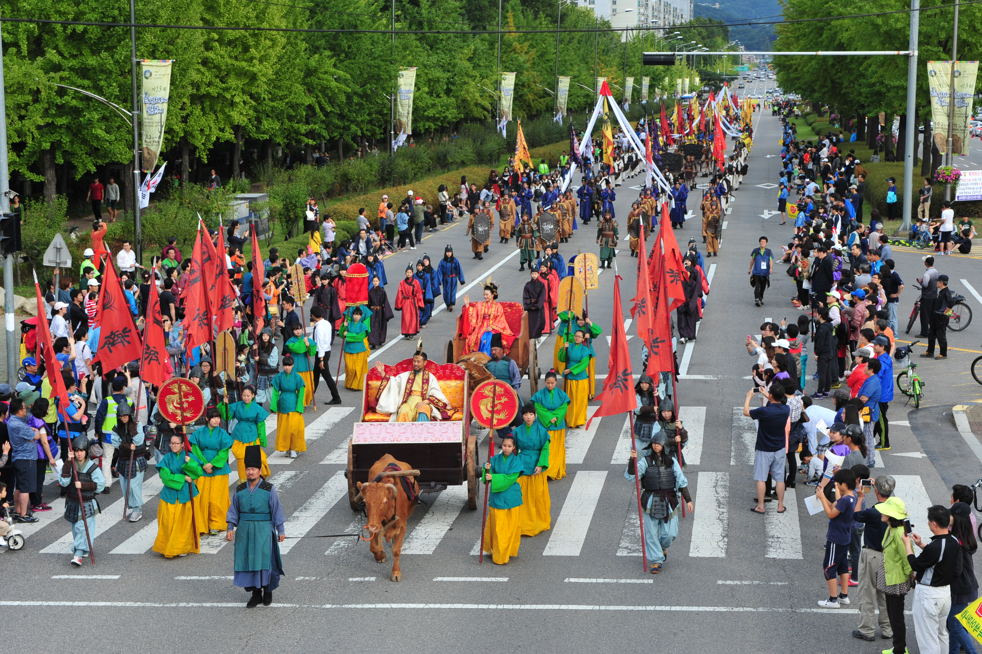 제13회 한성백제문화제 역사문화거리행렬